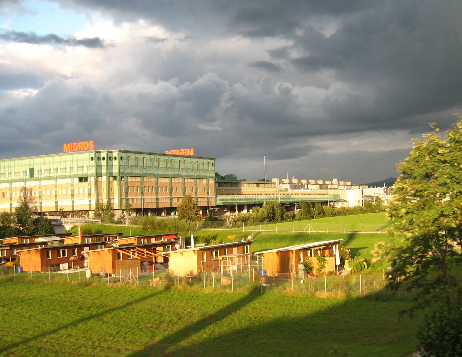 Migros Betriebszentrale Gossau